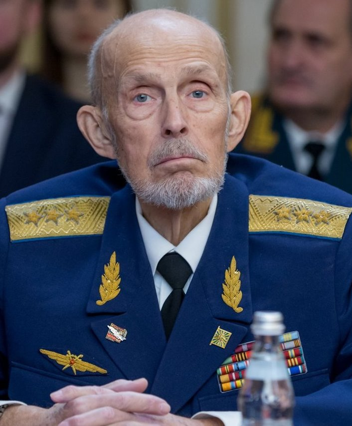 Синицын Виктор Павлович (род.1940) — советский и российский военный деятель, генерал-полковник